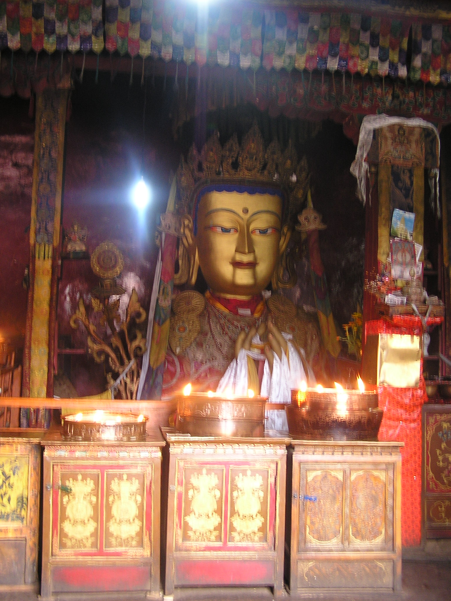 Lhasa 1.